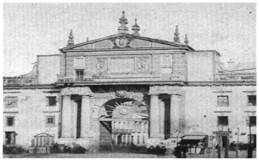 Puerta de Triana, derribada en 1868, fotografiada (Albúmina) por Louis Leon Masson en 1858